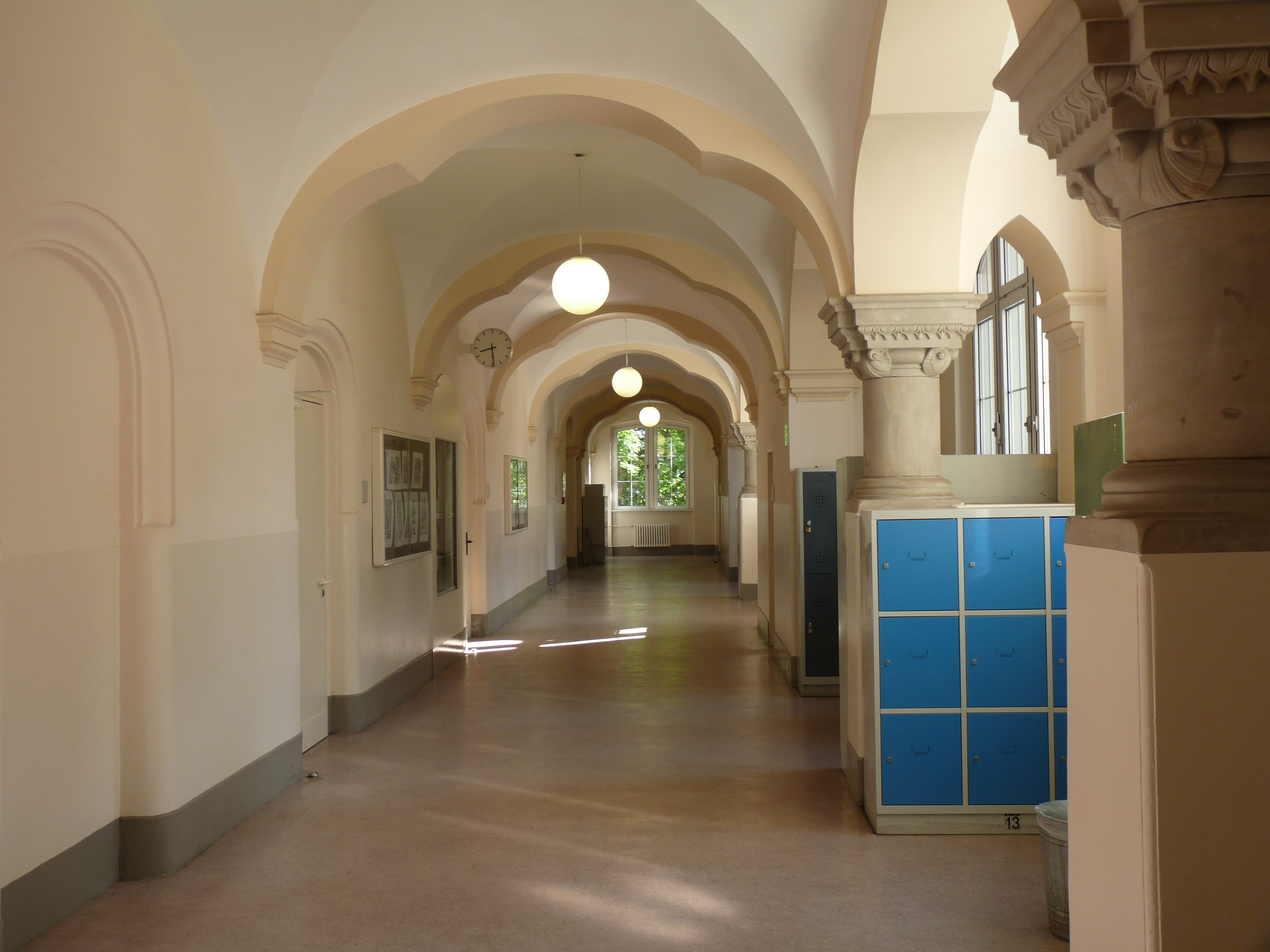 Flur der Hildegard-Wegscheider-Oberschule